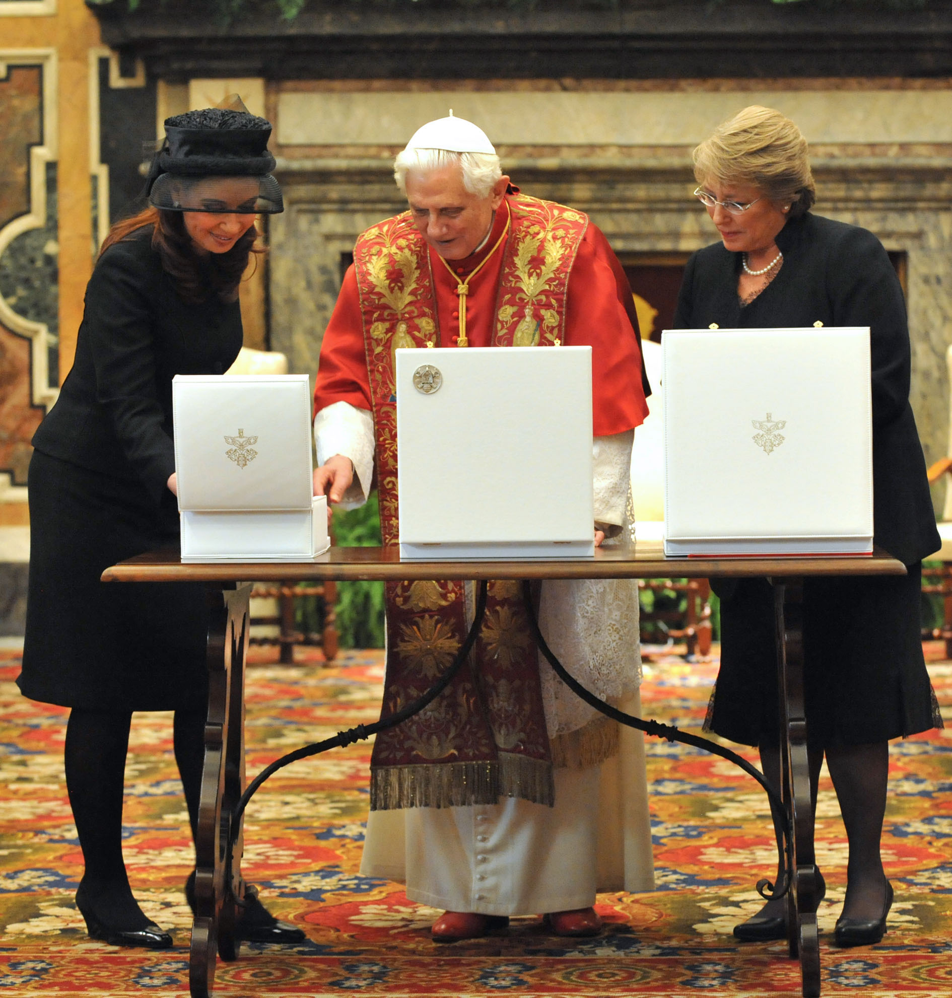 Cristina Fernández y su par de Chile, Michelle Bachelet, son recibidas por el Papa Benedicto XVI